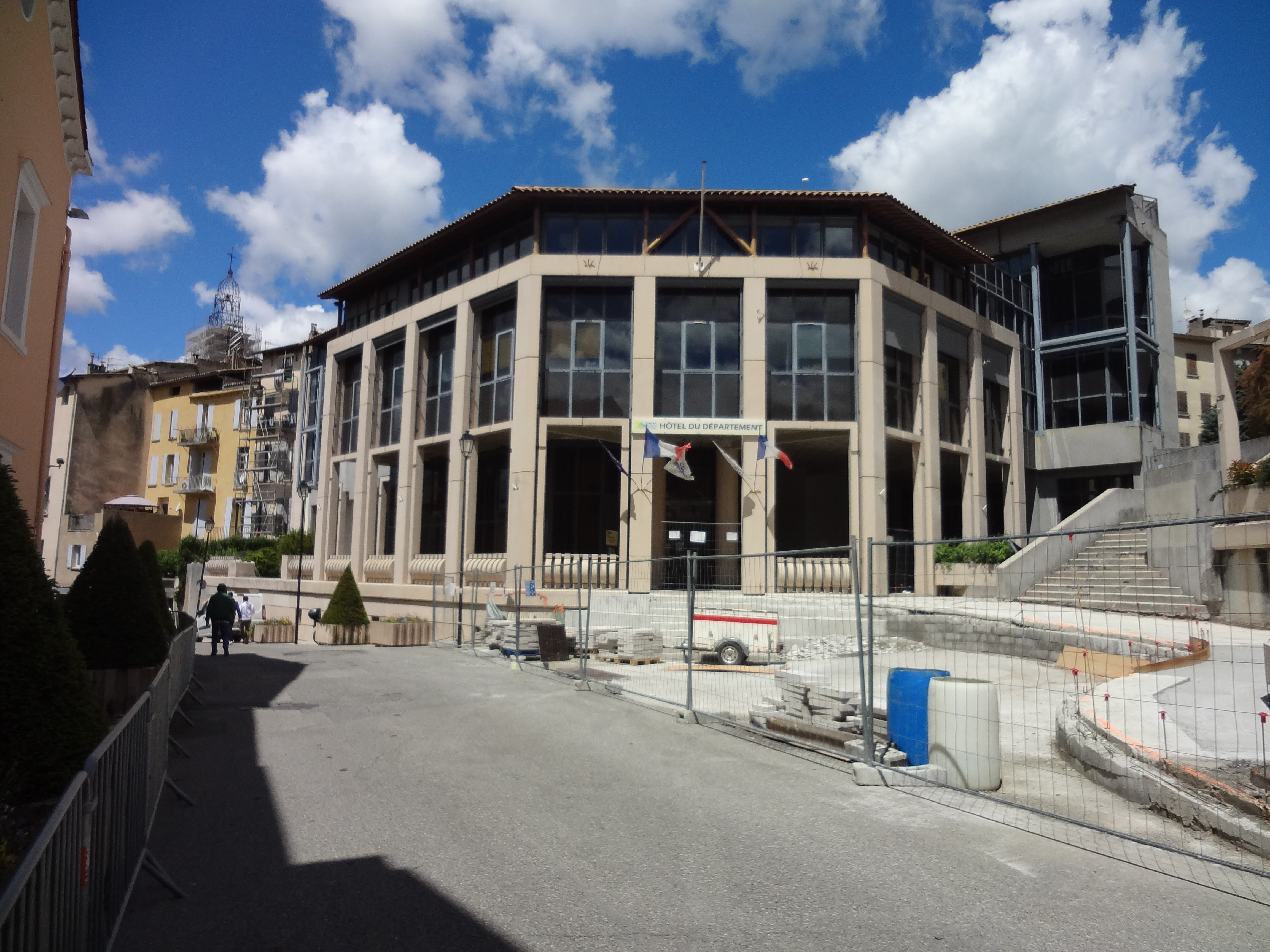 Bâtiment du conseil général des Alpes-de-Haute-Provence, à Digne-les-Bains